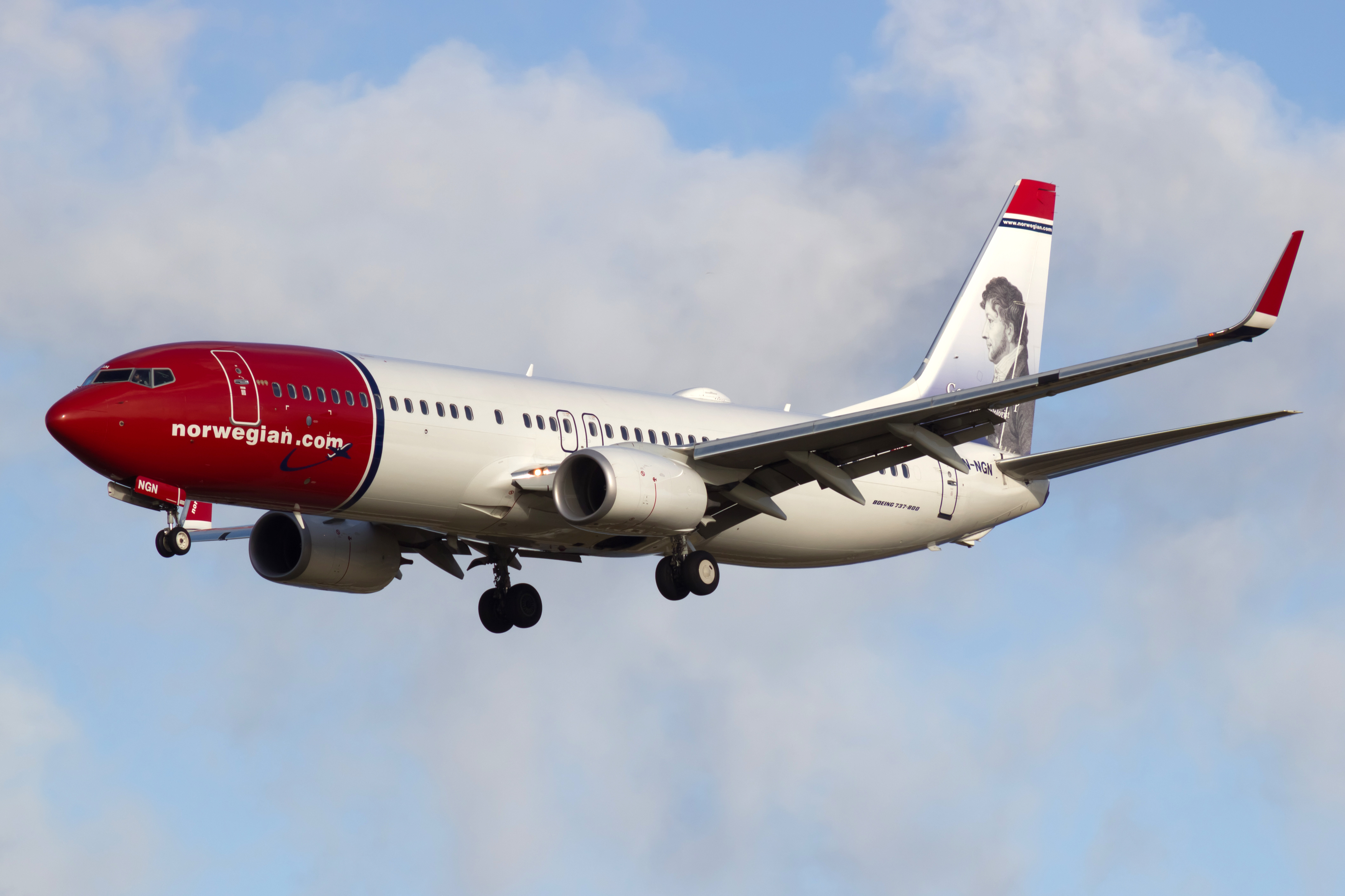 Boeing 737 de Norwegian aterrando no aeroporto de Copenhague.